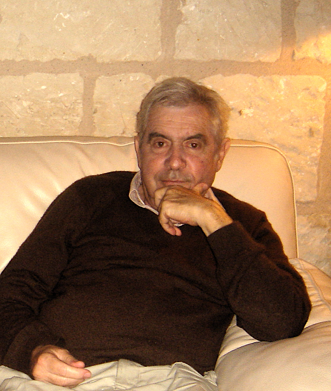 Gérard Lauzier, auteur de bande dessinée et metteur en scène français.